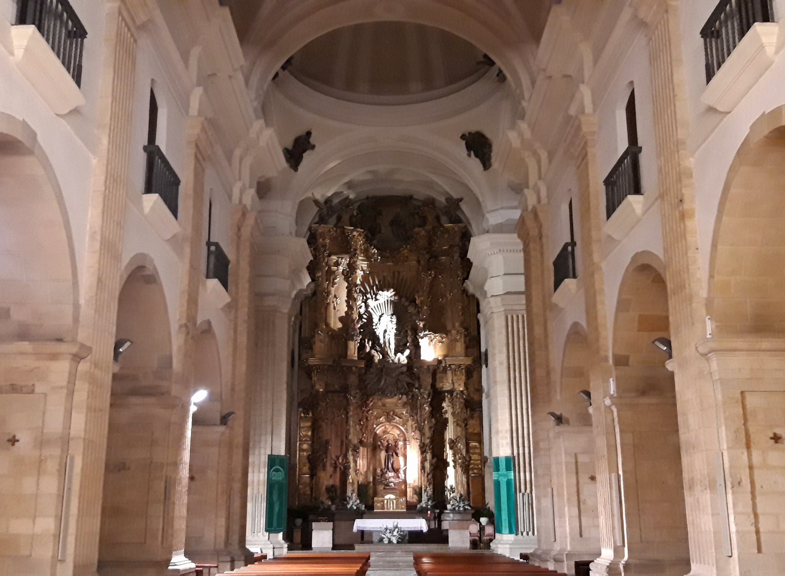 Interior de la Iglesia de San Francisco de León (España)